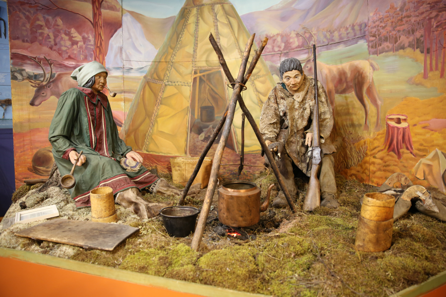 Историко-культурные и природные достопримечательности Баунтовский район